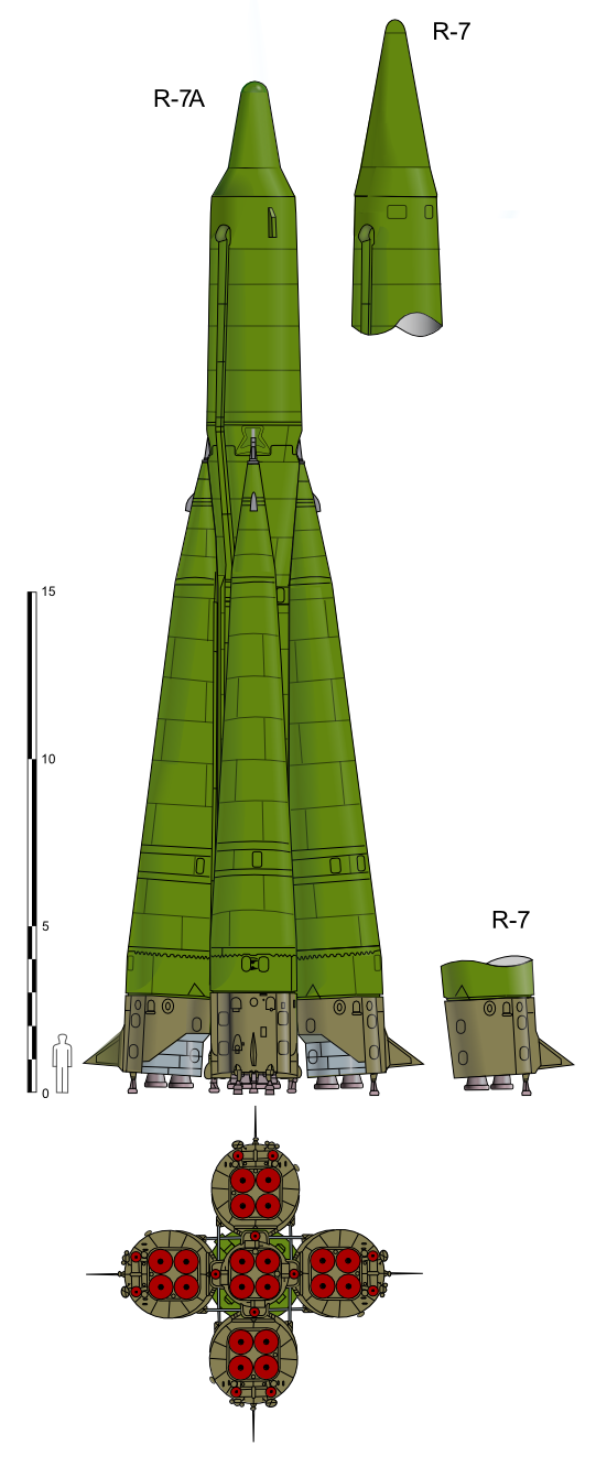 Dibujo del misil balístico soviético R-7 otan SS-6 Sapwood con un detalle de la variante R-7A